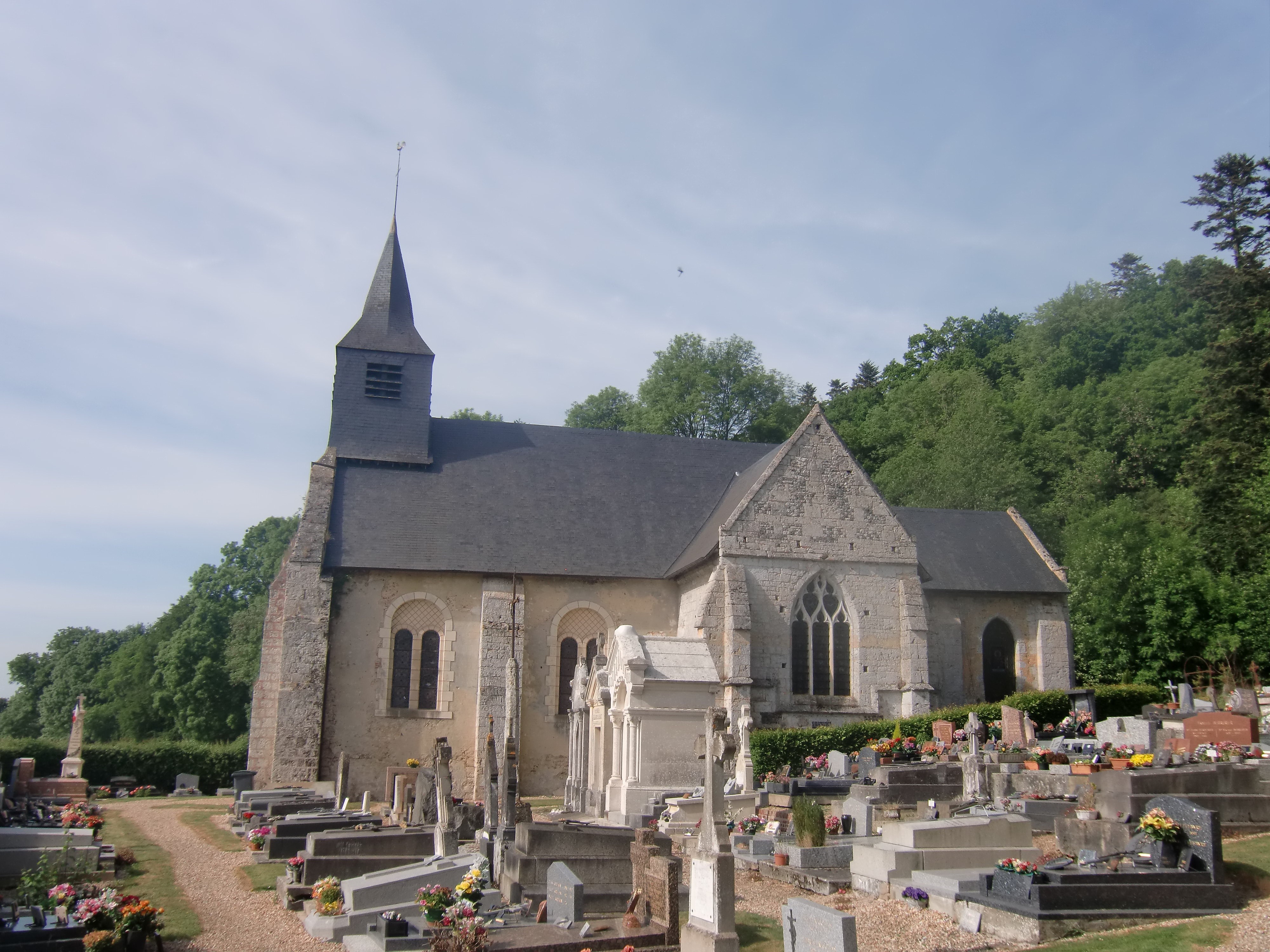 église paroissiale de Manneville-la-Raoult (Eure, Normandie, France)